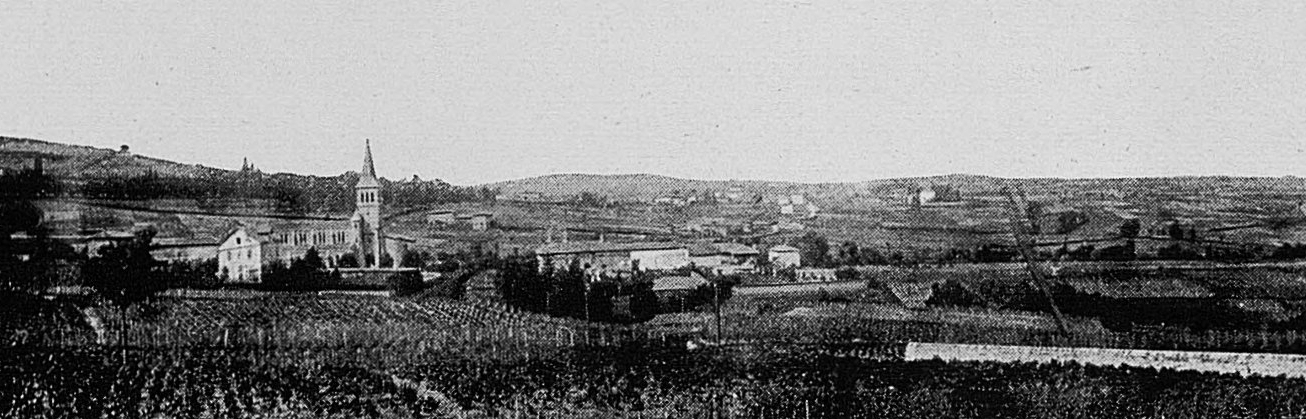 Dictionnaire illustré des communes du département du Rhône. Tome 1 / par MM. E. de Rolland et D. Clouzet.